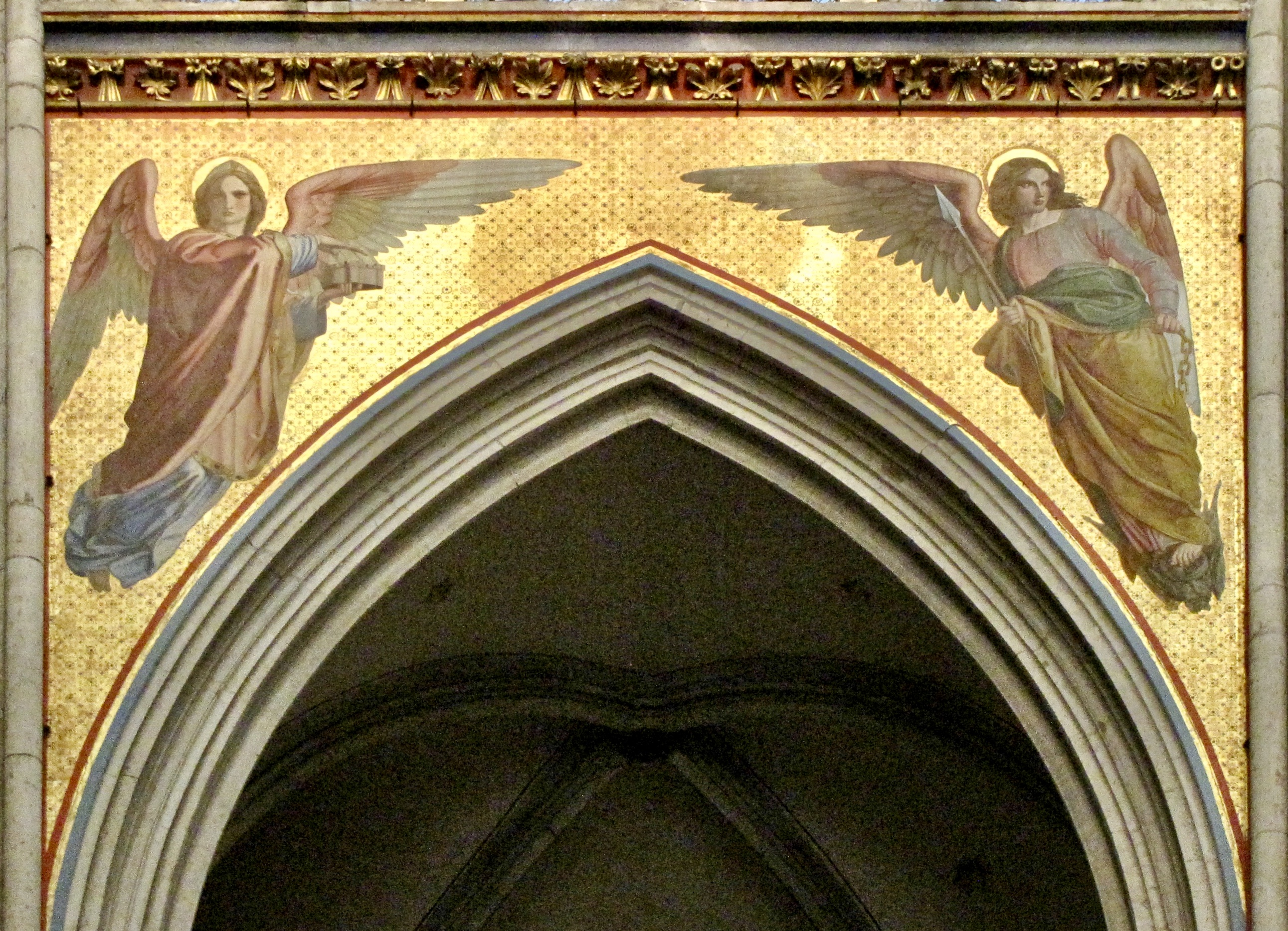 Kölner Dom: Chorarkadenmalerei des Spätnazareners Edward von Steinle (1843-45). Darstellung der neun Chöre der Engel in den 15 Arkadenzwickeln. Fresko. Figuren auf goldenem Ornamentgrund.